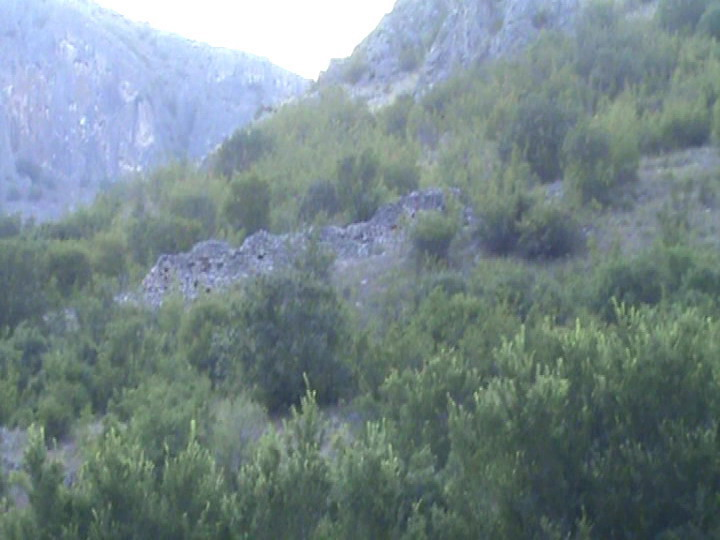 Градиште 2009 сликано од Младеновски Јовица